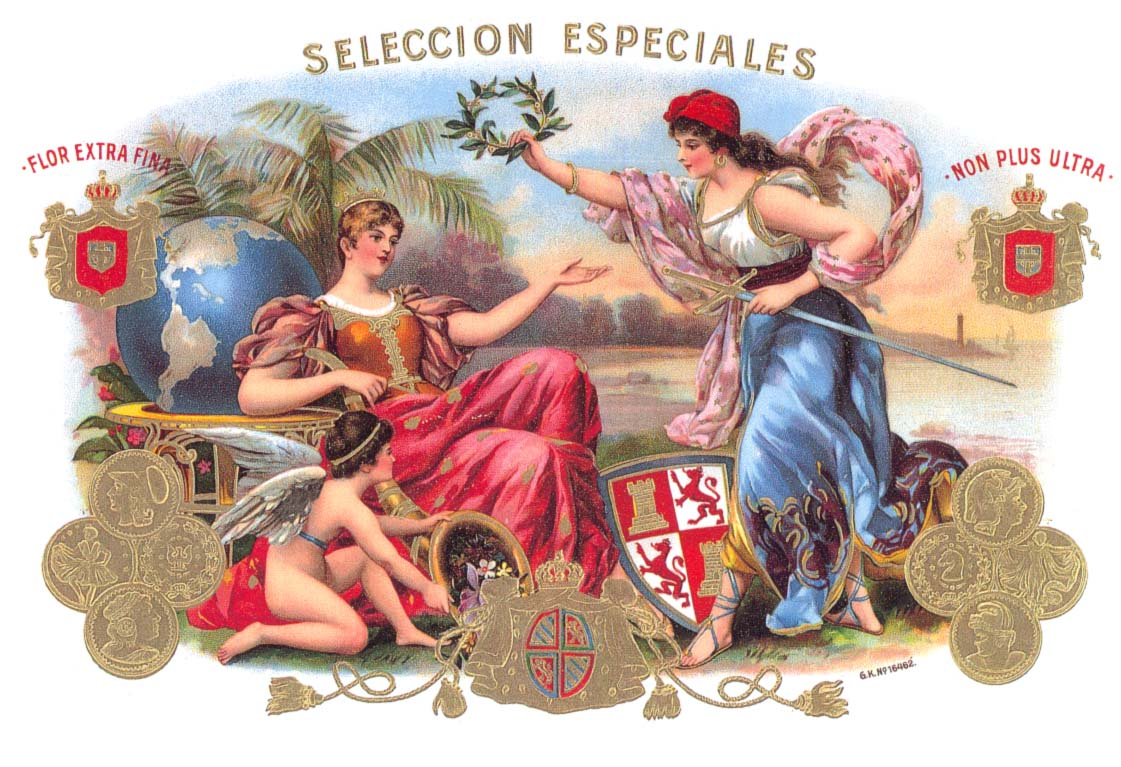 Zigarrenkisten-Deckelbild, Innenseite, Chromolithografie